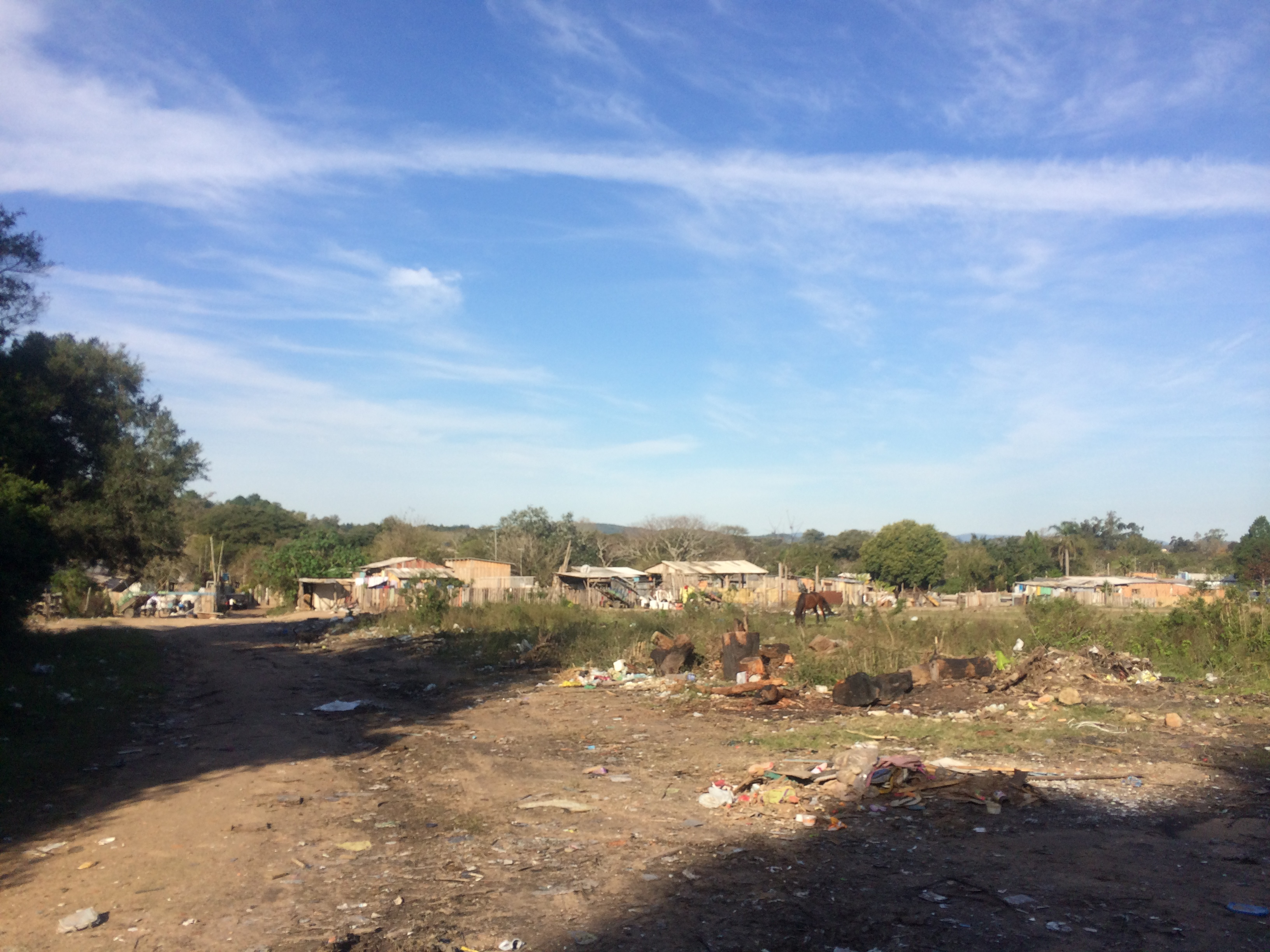 Ocupação Febem, uma ocupação desordenada e irregular no Bairro Belém Novo, próxima à Zona Rural em Porto Alegre - RS.